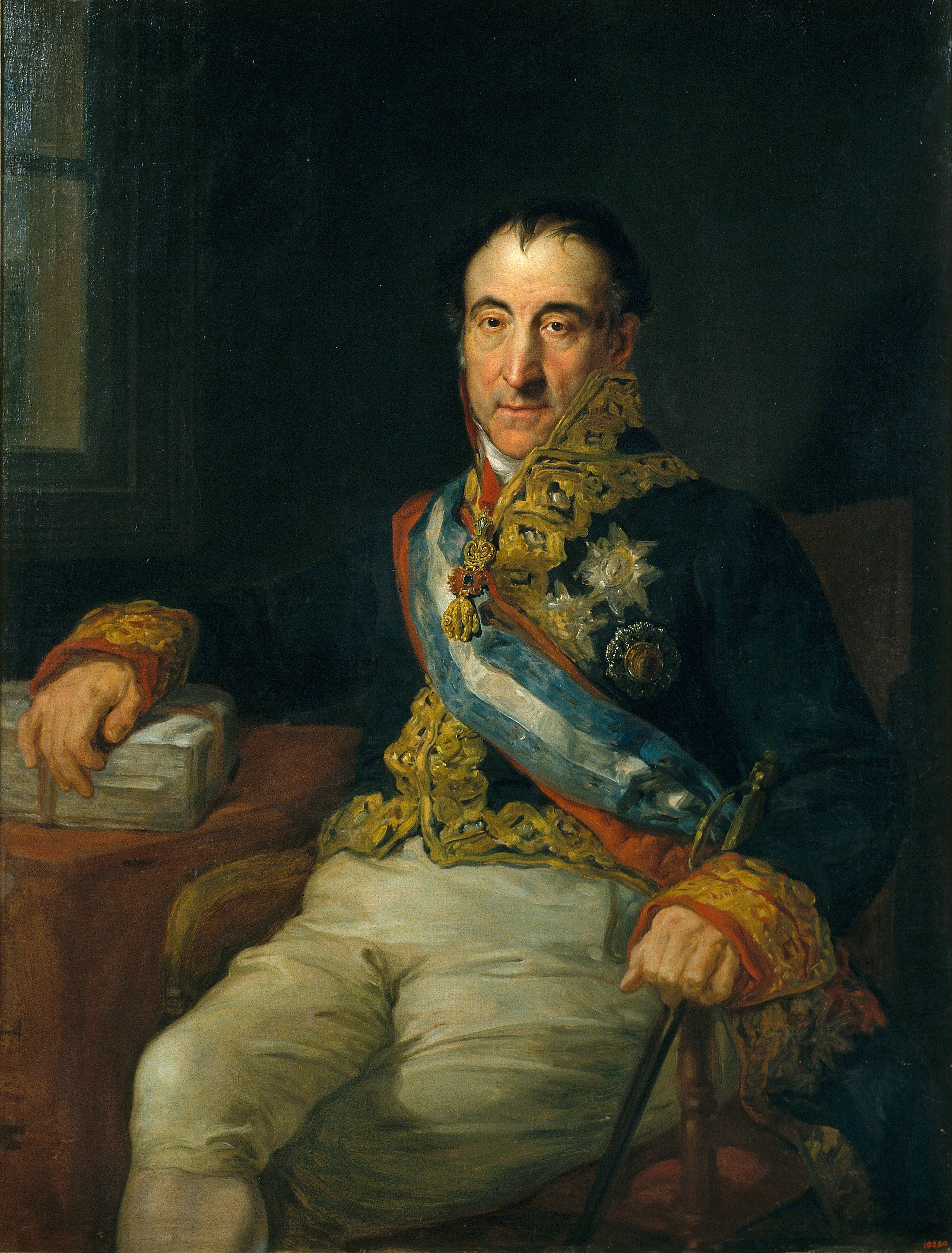 Retrato del aristócrata y diplomático español Pedro Gómez Labrador (1772-1850), que fue el primer marqués de Labrador y el embajador del reino de España durante el Congreso de Viena de 1815, reunido tras la derrota definitiva del emperador Napoleón en la batalla de Waterloo.